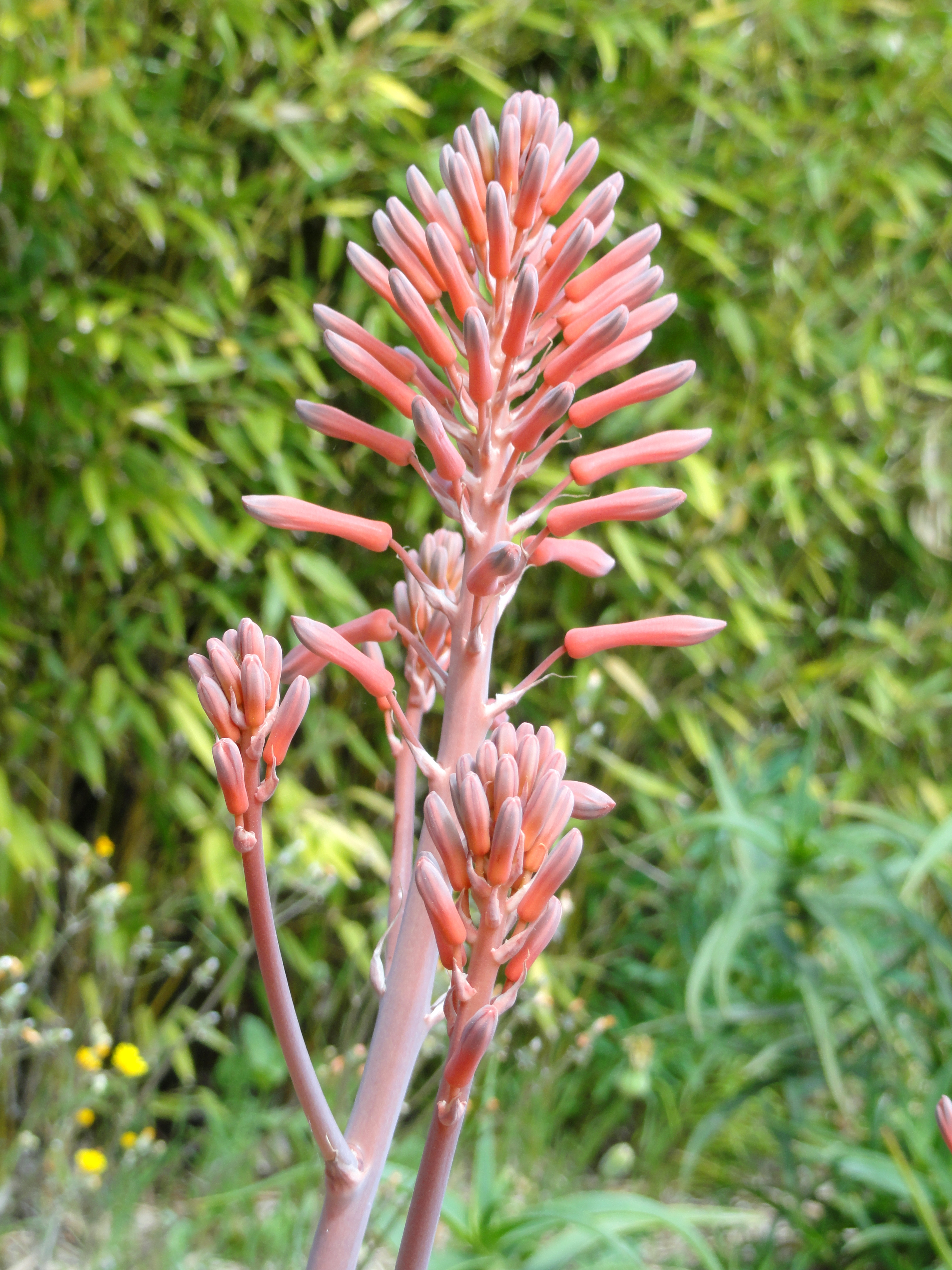 Aloe saponaria specimen in the Jardin d'oiseaux tropicaux, La Londe-les-Maures, France.